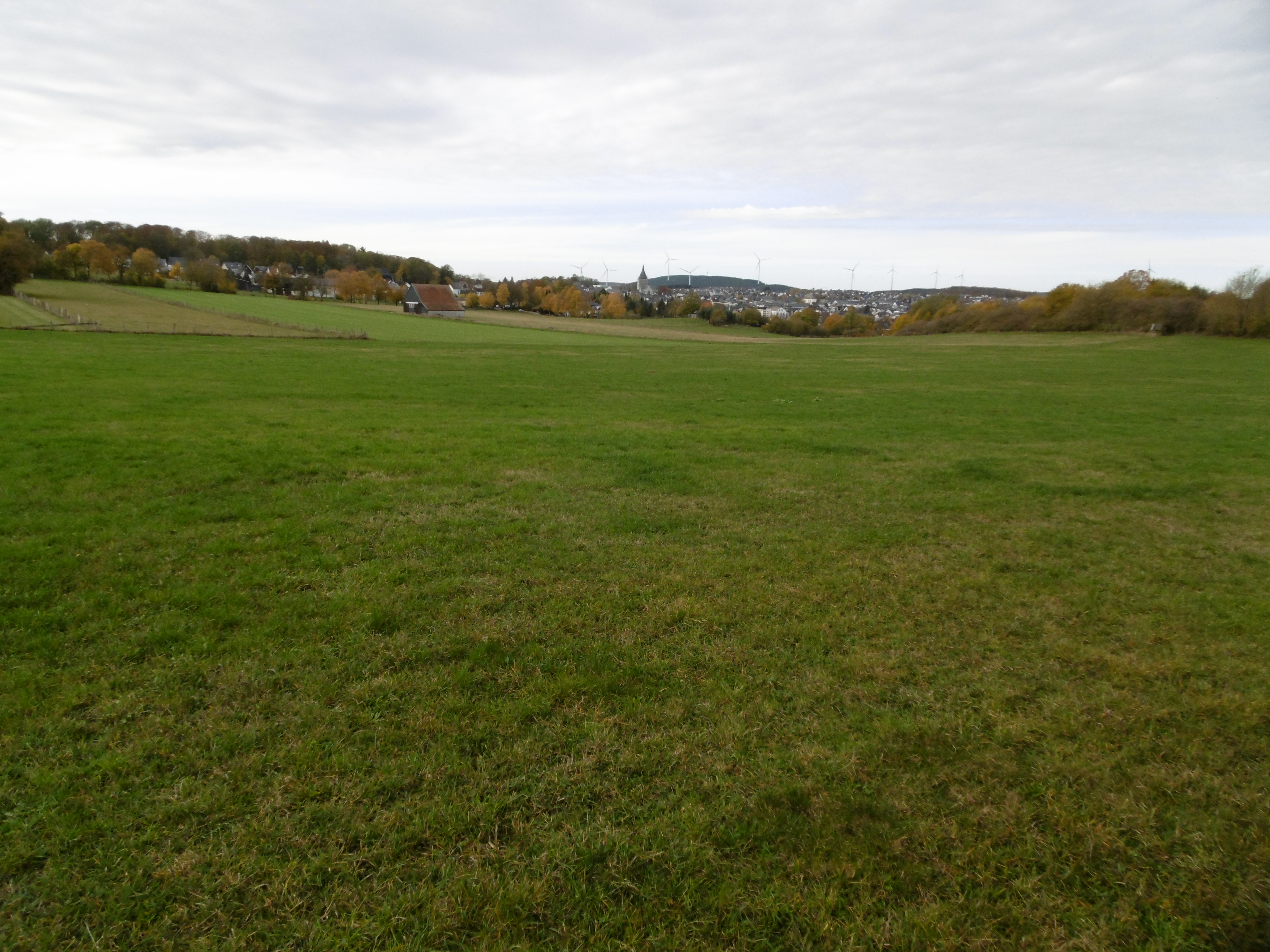 Landschaftsschutzgebiet Offenland südöstlich Brilon mit Brilon im Hintergrund vom NSG Frettholz Richtung Nordwest.